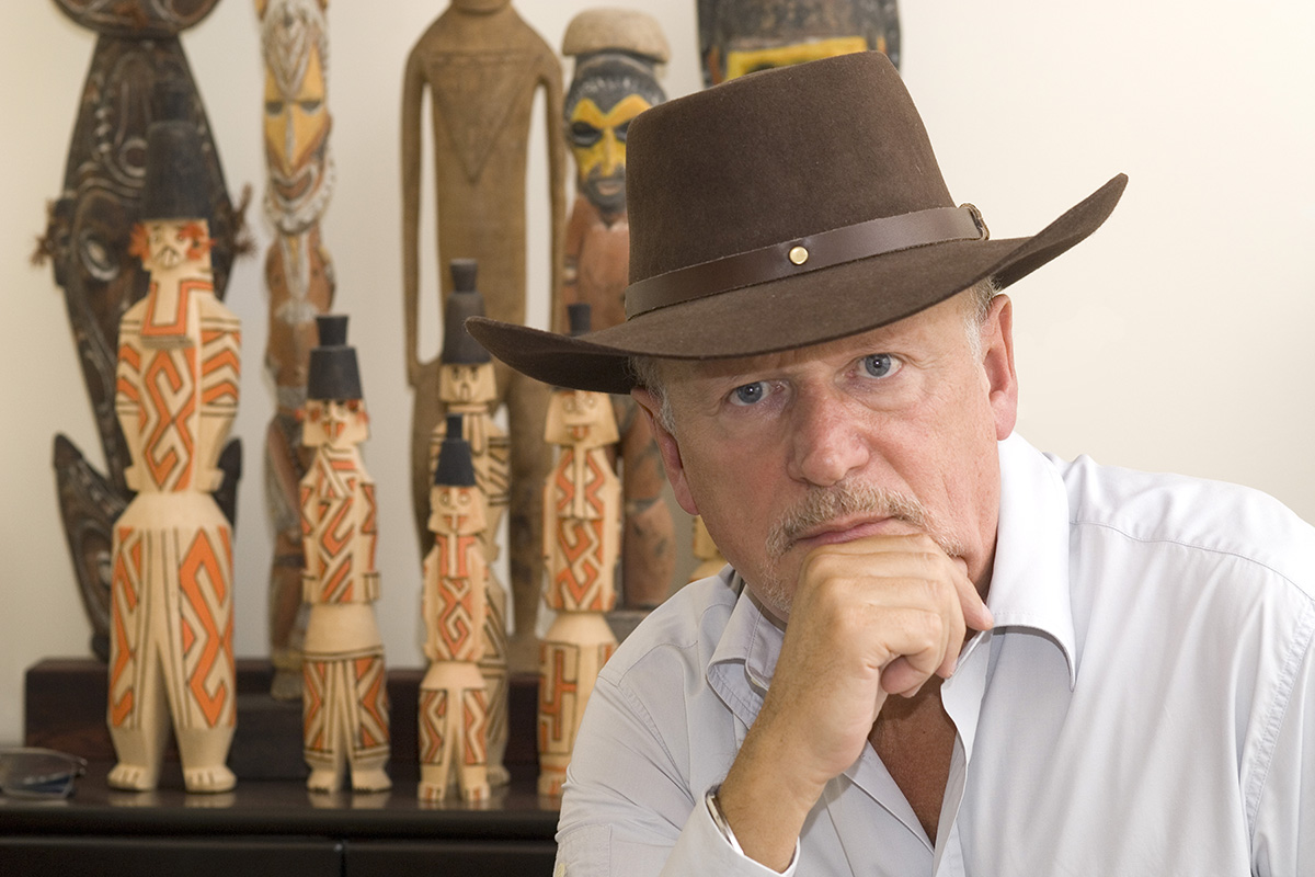 Leigheb Maurizio